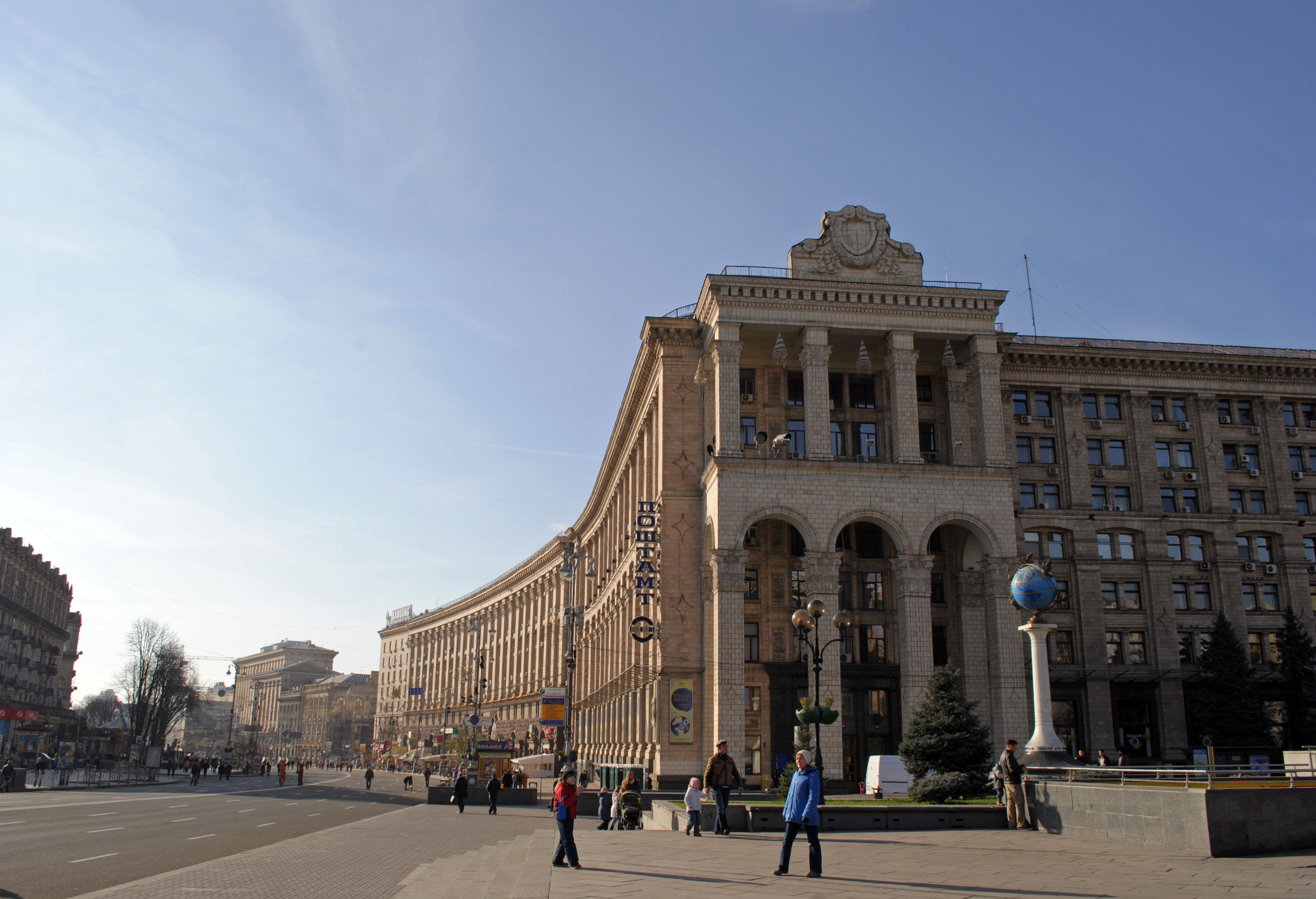 Будинок адміністративний міністерства зв'язку та головпоштамт, Київ, Хрещатик вул., 20-22